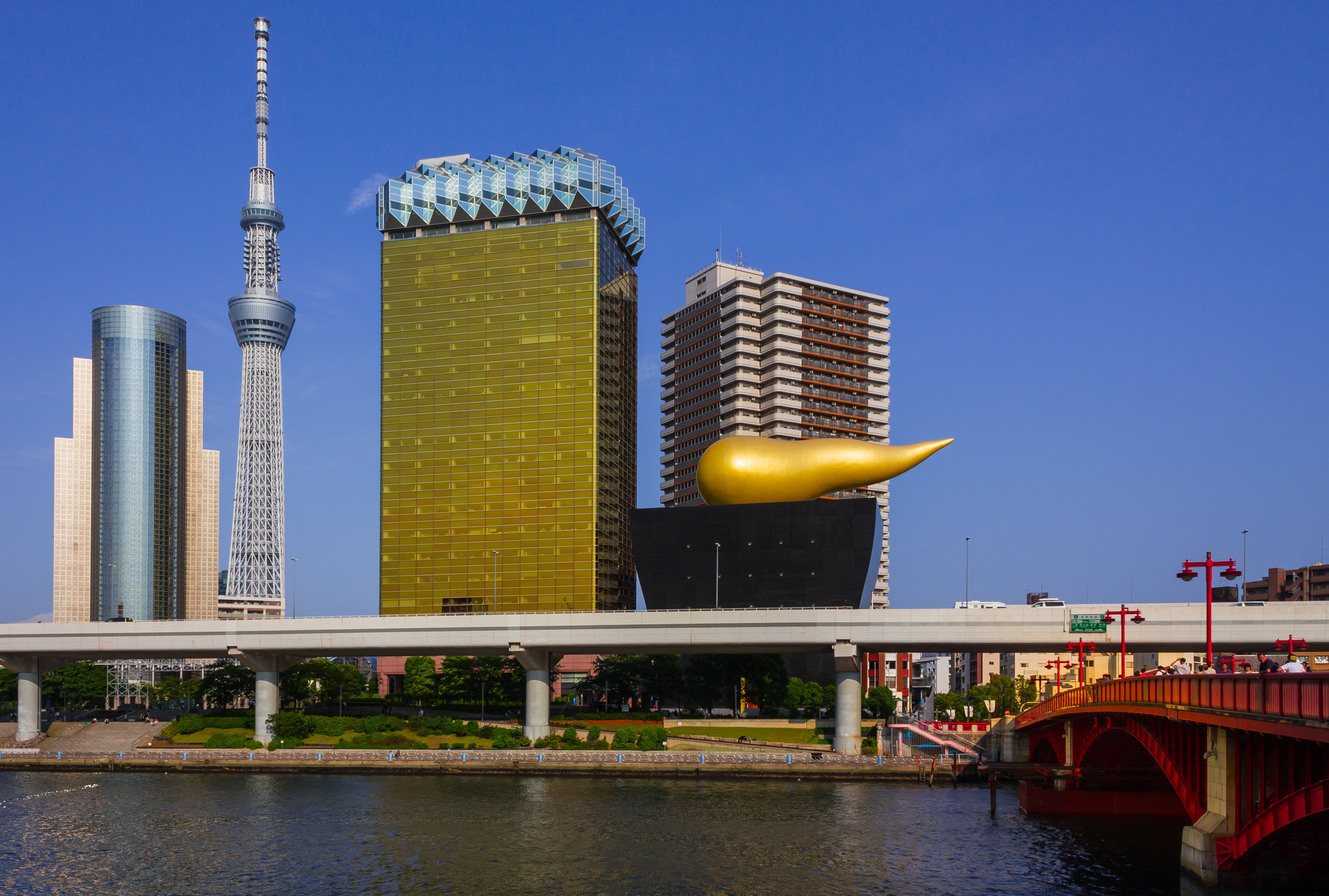 スカイツリー、アサヒビール本社、墨田区役所。吾妻橋より。